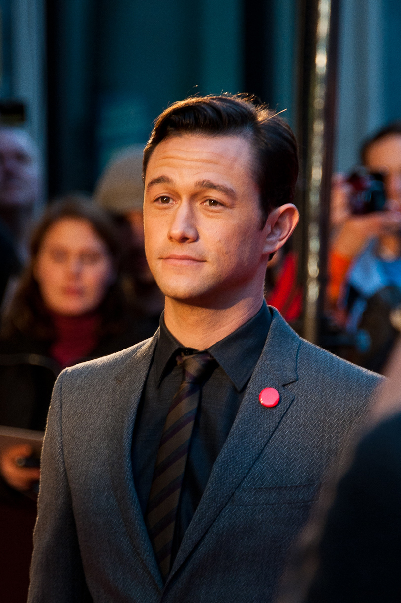 WP - random_-5